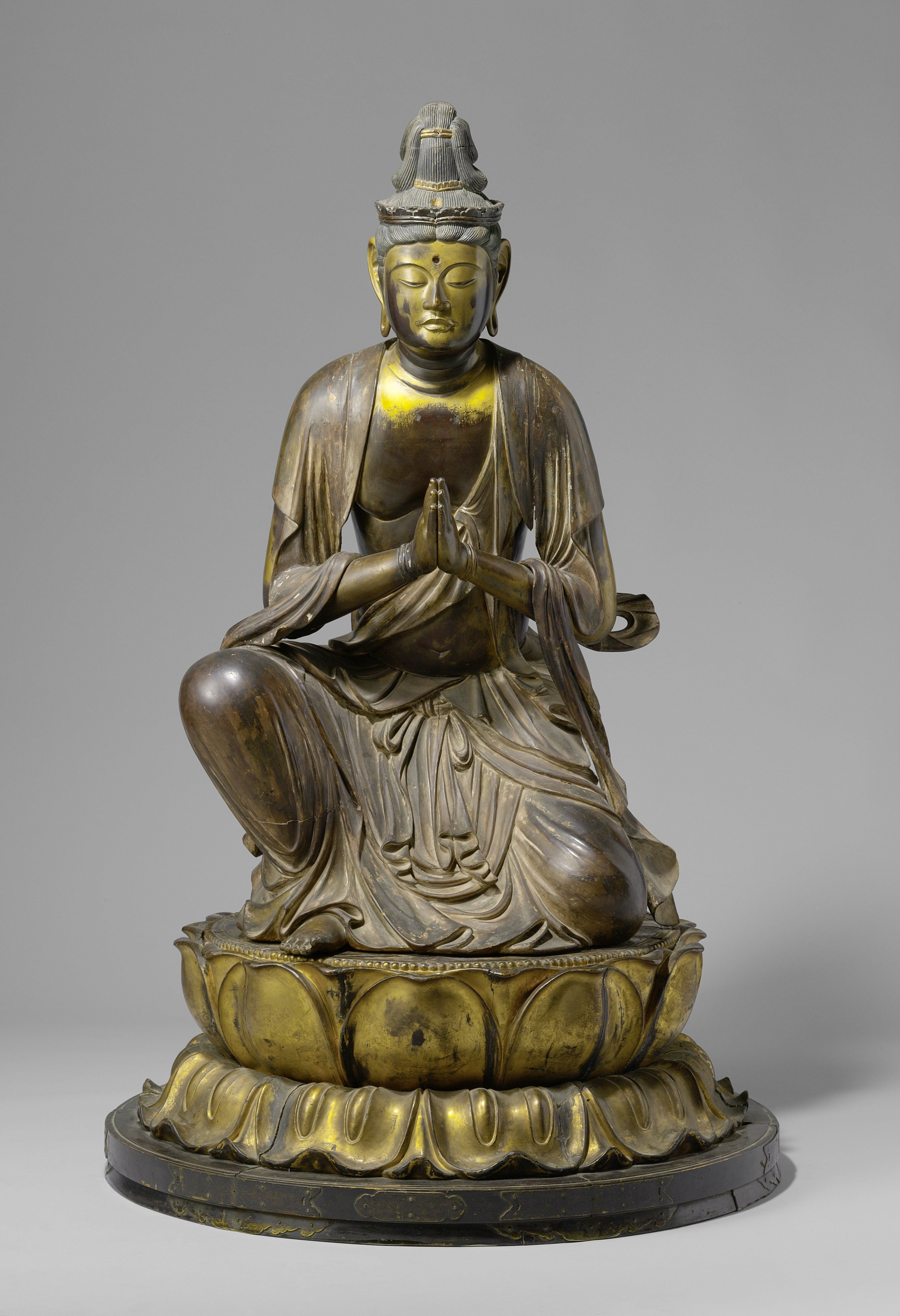 IdentificatieTitel(s): SeishiBodhisattva SeishiObjecttype: beeldhouwwerk beeld Objectnummer: AK-MAK-119Omschrijving: Beeld van hout met verguld lakwerk, van de bodhisattva Seishi, half knielend en met de handen verticaal tegen elkaar gehouden voor de borst, in de handhouding van aanbidding (kongō gasshō, anjali-mudra). De sokkel is opgenomen onder inventarisnummer AK-MAK-119-1.VervaardigingVervaardiger: beeldhouwer: anoniemPlaats vervaardiging: JapanDatering: ca. 1400 - ca. 1600School / stijl: Muromachi-periode (1338-1573)Fysieke kenmerken: hout met verguld lakMateriaal: hout lak Afmetingen: Geheel: h 103,5 cmBeeld: b 61,5 cm × d 59,5 cmSokkel: h 30,5 cm × b 86,3 cm × d 70,5 cm × d 60,3 cmVerwerving en rechtenCredit line: Bruikleen van de Vereniging van Vrienden der Aziatische Kunst (aankoop veiling Ernst Karl Becker, Berlijn, 1950)Verwerving: bruikleen 1972Copyright: Publiek domeinHerkomst: …; collection Paul Wegener;{Note RMA.} his sale, Berlin(Ernst Karl Becker), 29 and 30 November 1950, no. 753, fl. 3,279, with support from the Vereniging Rembrandt, to the Vereniging van Vrienden der Aziatische Kunst;{Note RMA.} from whom on loan to the museum, 1972